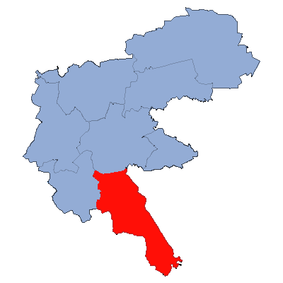 Gmina Krzyżanowice w powiecie raciborskim-mapka